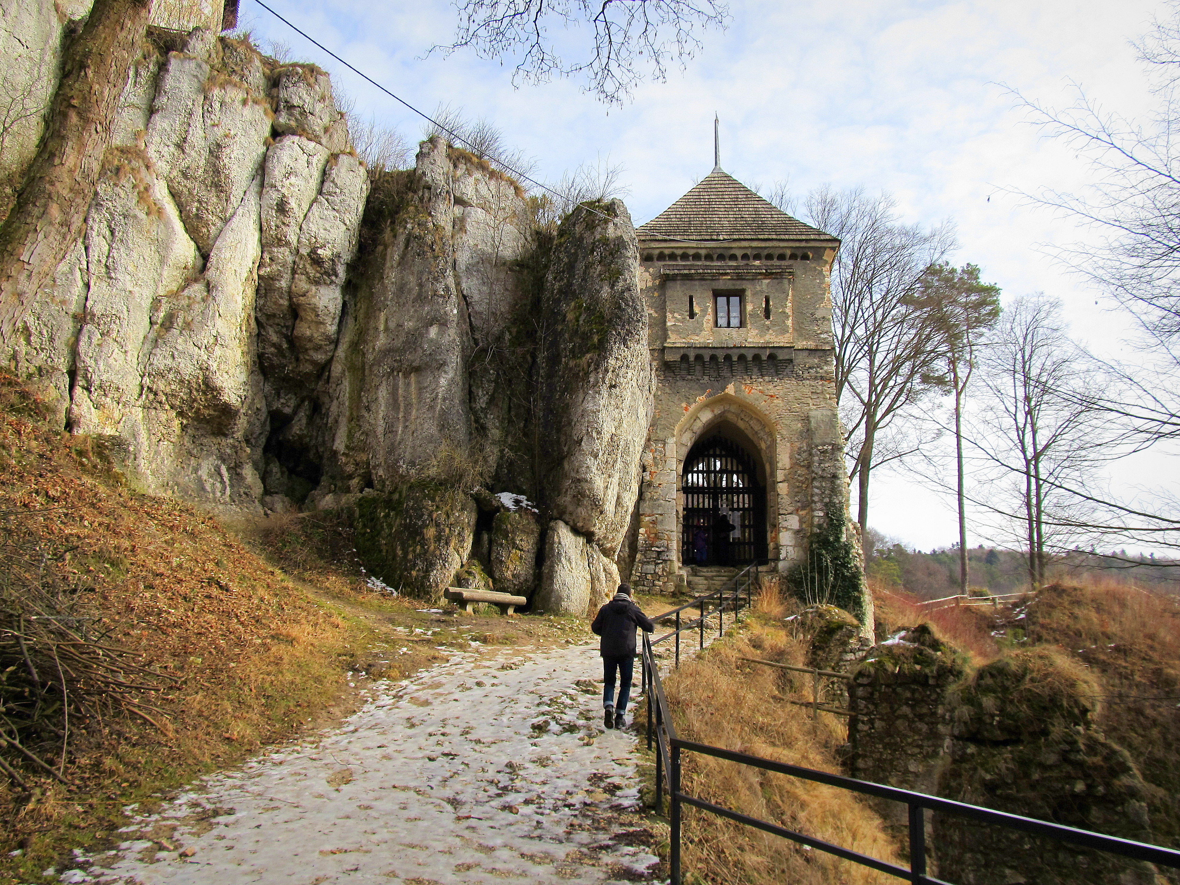 Ojców, ruiny zamku (ze wzgórzem), XIV, XVII